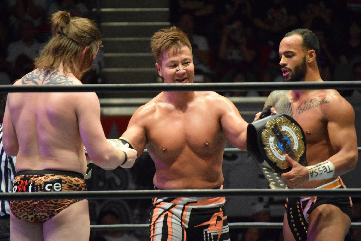 2016年9月25日 ワールド記念ホール「DESTRUCTION in KOBE」 デビッド・フィンレー（左）、小島聡（中）、リコシェ（右）